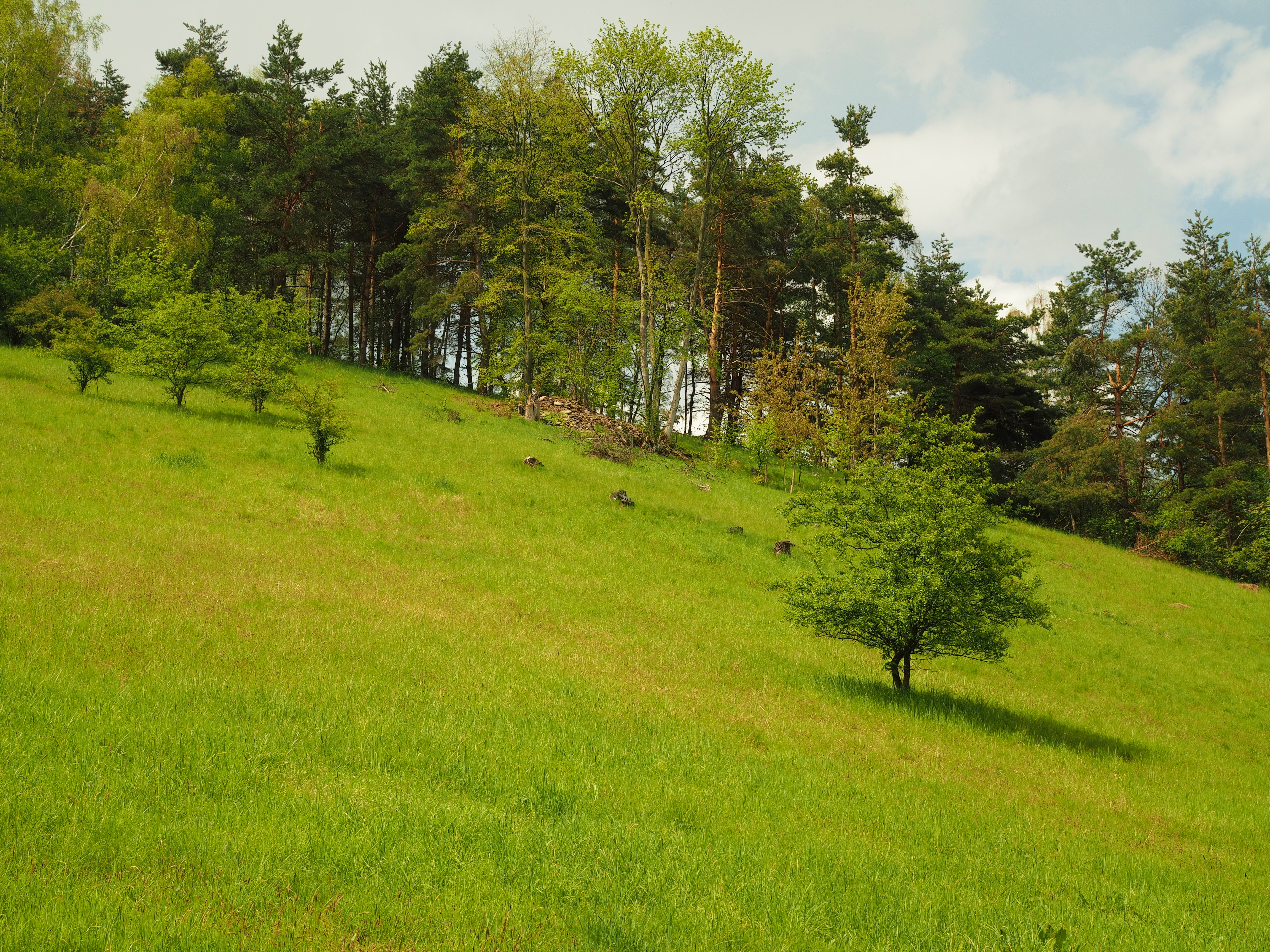 Přírodní památka Ostražka (Natural monument Ostražka) Project: Chráněná území